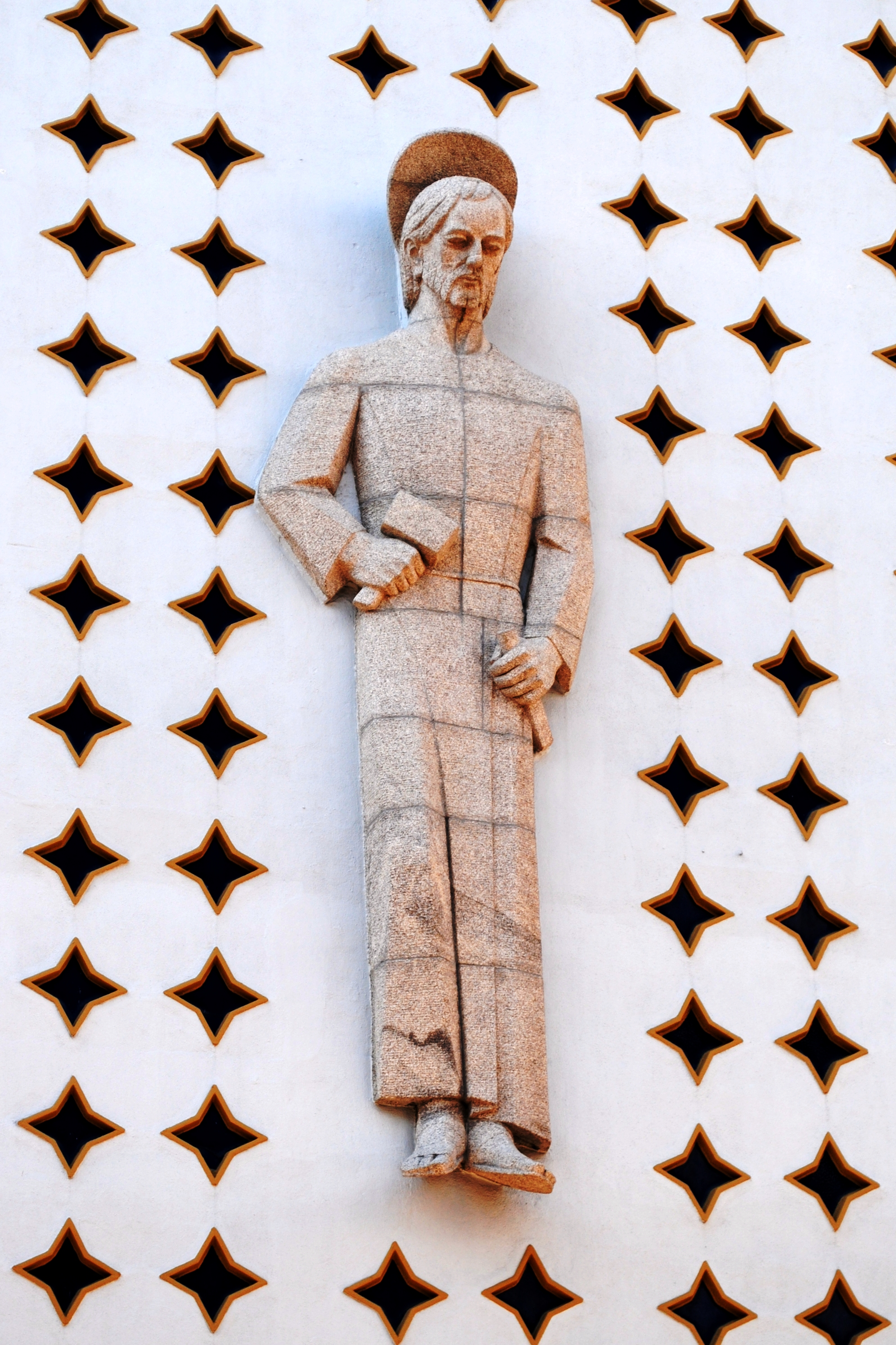 Escultura de Xoán Piñeiro Nogueira en la fachada de la iglesia parroquial de San José Obrero de Vigo.